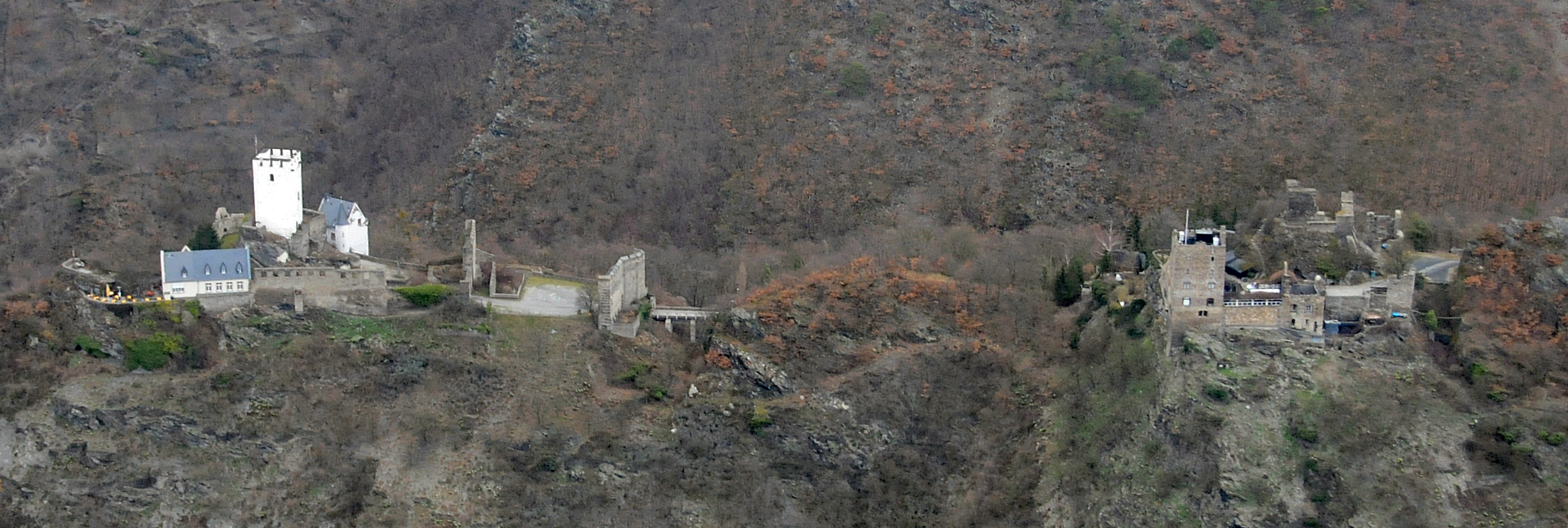 Luftbild der Burgen Sterrenberg und Liebenstein über Kamp-Bornhofen, "die feindlichen Brüder" genannt